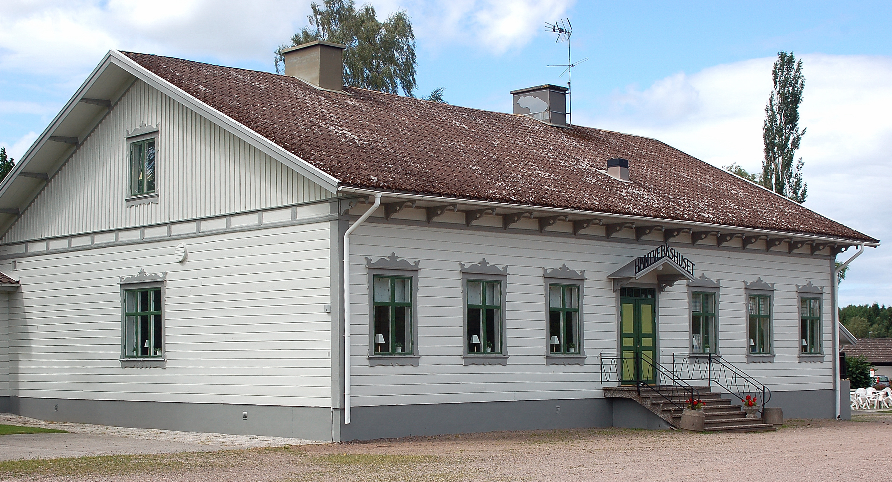 Hova tingslags tingshus, senare Hova Hantverkshus